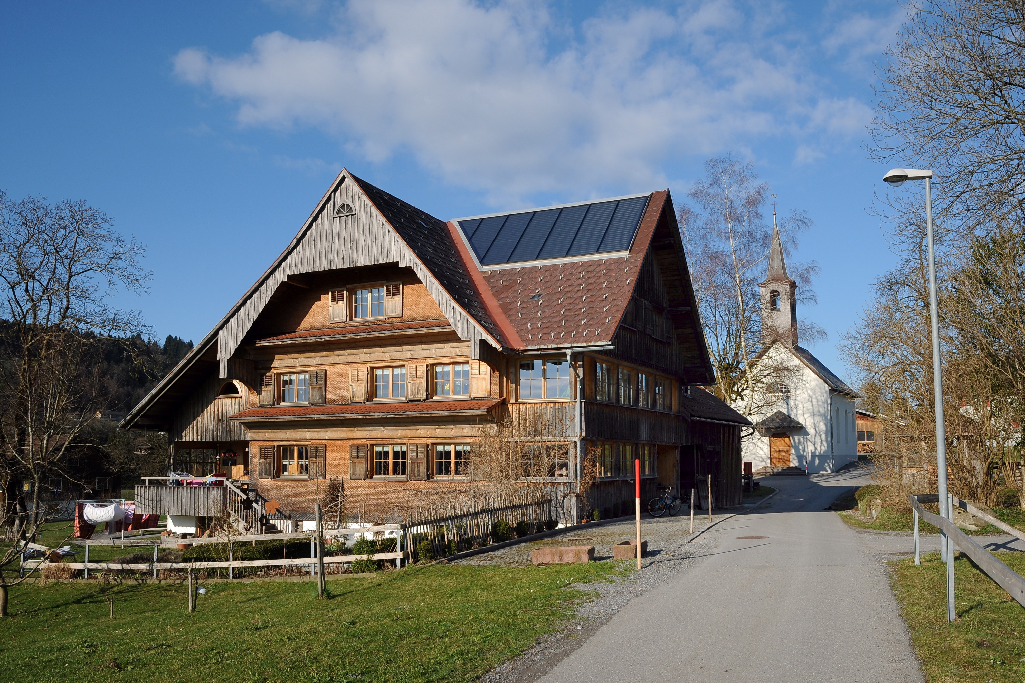 aus dem DEHIO Vorarlberg 1983: KAPELLE, Maria Schnee, im Dornbirner Winsau. Rechteckbau mit 3/8-Chor, Satteldach, Glockentürmchen mit Spitzhelm über der Fassade. Nördlich am Chor Sakristei. Betraum mit Tonnengewölbe, Rundbogenfenster, eingezogener gedrückter Chorbogen, 3/8-Chor mit Tonnengewölbe. Fassade mit Rosettenfenster. Fresko im Betraum Krönung Mariens, Mitte 19. Jh.*** Altäre von Matthäus Thurnher, Handelsmann in Dornbirn, gestiftet. Hochalter klassizistischer Aufbau 1870, Altarbild Mariena mit Kind, bezeichnet I.C. Rick pinx. 187* (?)., Oberbild Gott Vater und Hl. Geist, Figuren links hl. Petrus, rechts hl. Paulus, Mitte 19. Jh. Linker Seitenaltar mit neuromanischem Aufbau, Altarbild hl. Wndelin von Caspar Rick. Rechter Seitenaltar mit neuromanischem Aufbau, Altarbild hl. Martin, von Caspar Rick.